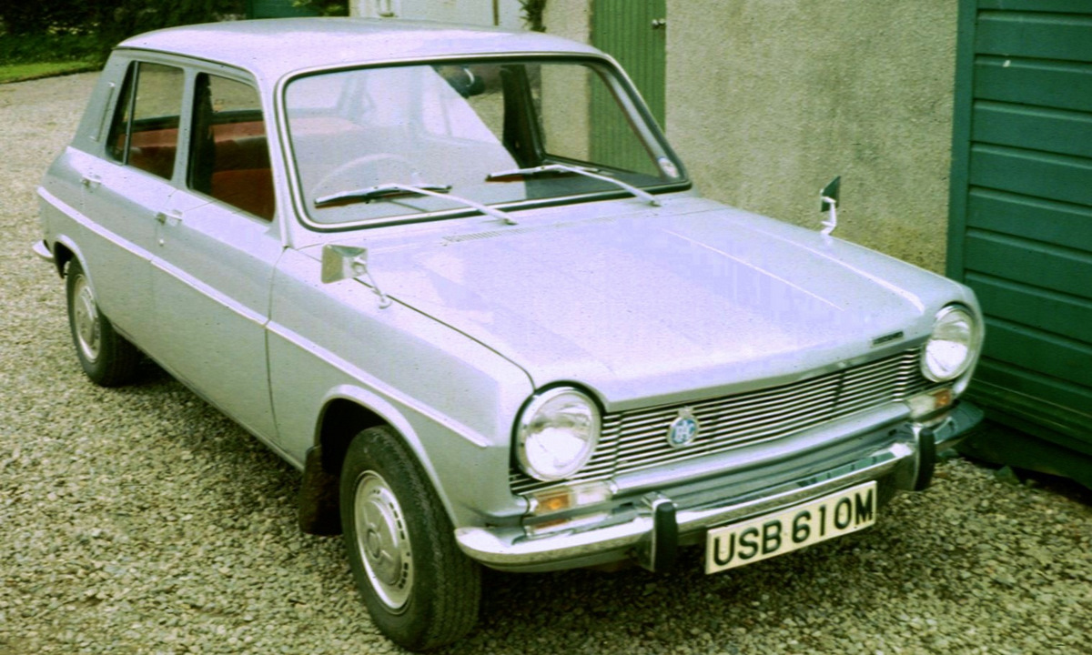 Simca 1100 en Ecosse